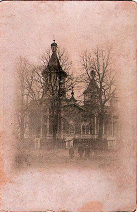 Беларуская (тарашкевіца): Пясочнае (Piasočnaje). Царква